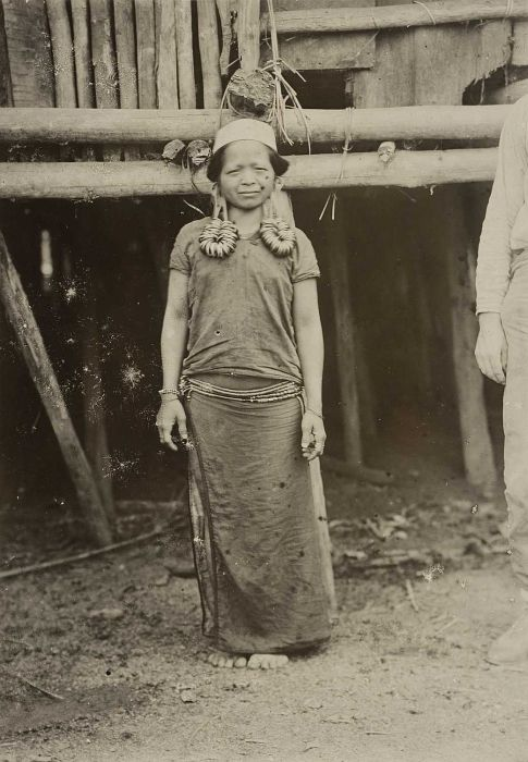 Foto. Deze foto is gemaakt tijdens de Commissiereis naar Centraal-Borneo van A.W. Nieuwenhuis. Portret van een Kenja Dajak vrouw, Apokajan of Boven-Boeloengan